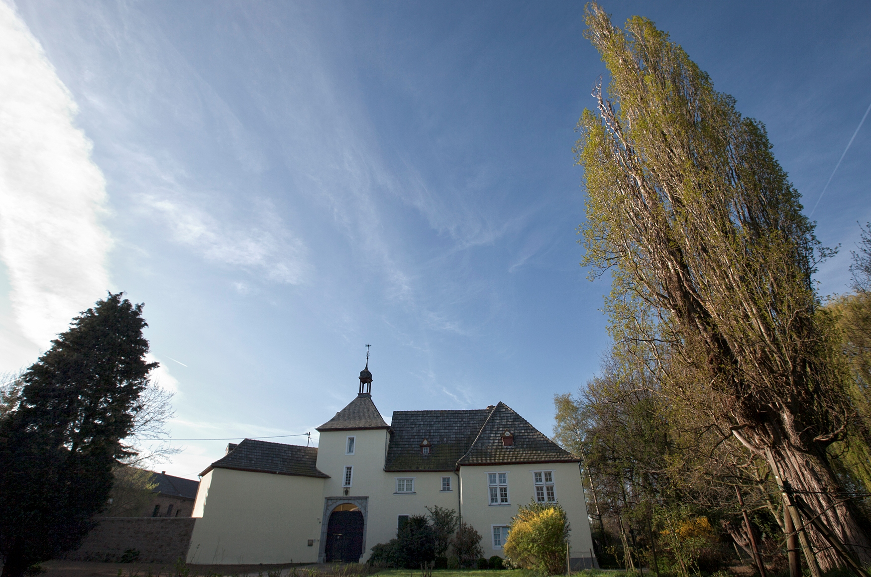 Burg Großbüllesheim, Euskirchen-Großbüllesheim This is a photograph of an architectural monument.It is on the list of cultural monuments of Euskirchen